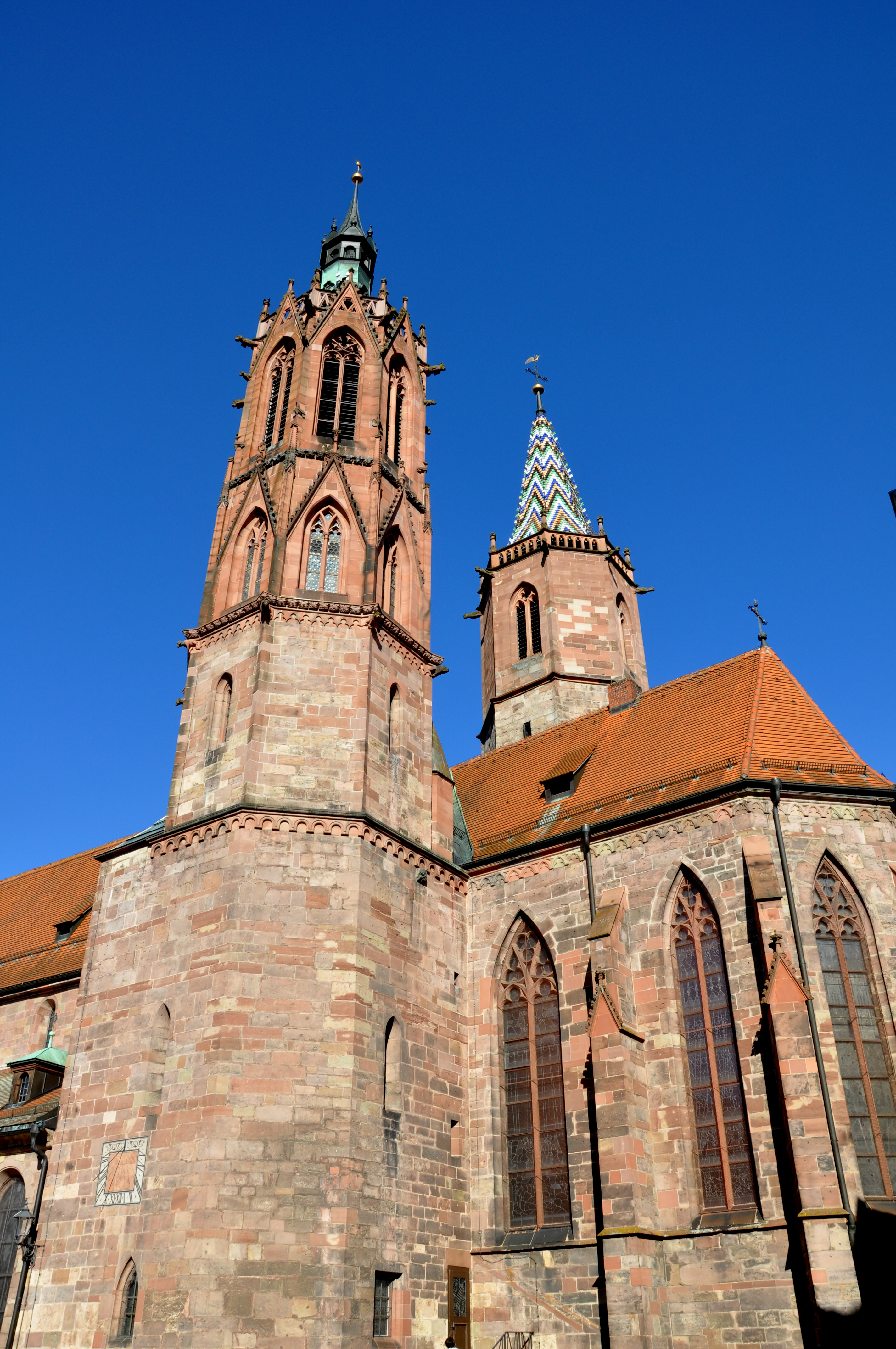 Villingen-Schwenningen, Stadtbezirk Villingen Münster Unserer Lieben Frau